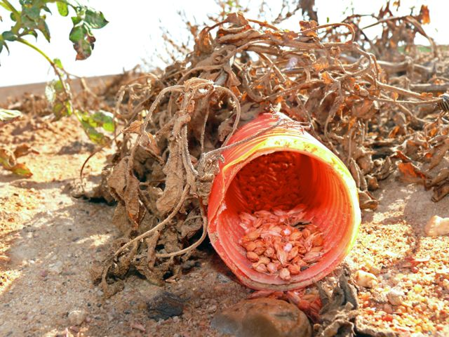 Clorofacinona presentada en granos de cebada colocada en tubos de plástico para combatir la plaga de topillos (Microtus arvalis astorianus) en Castilla y León, 2007; como puede apreciarse, el veneno es fácilmente accesible